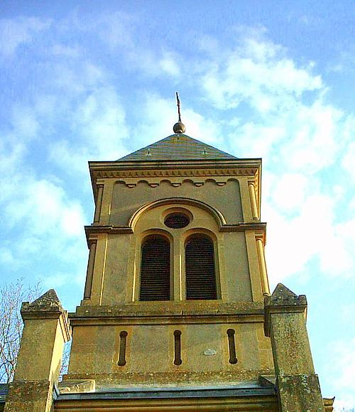 Vigy, Rabas - France